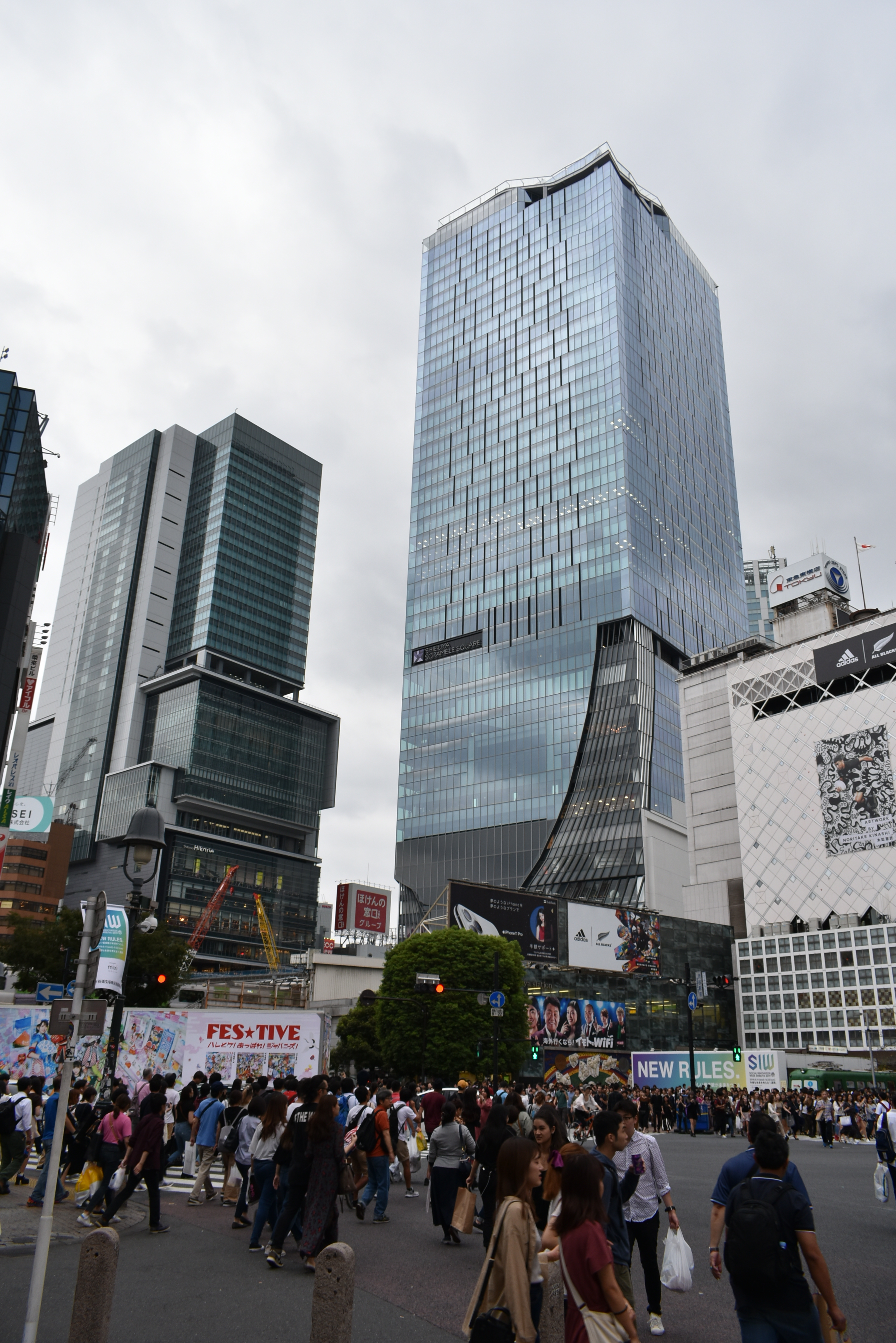 渋谷駅改良工事